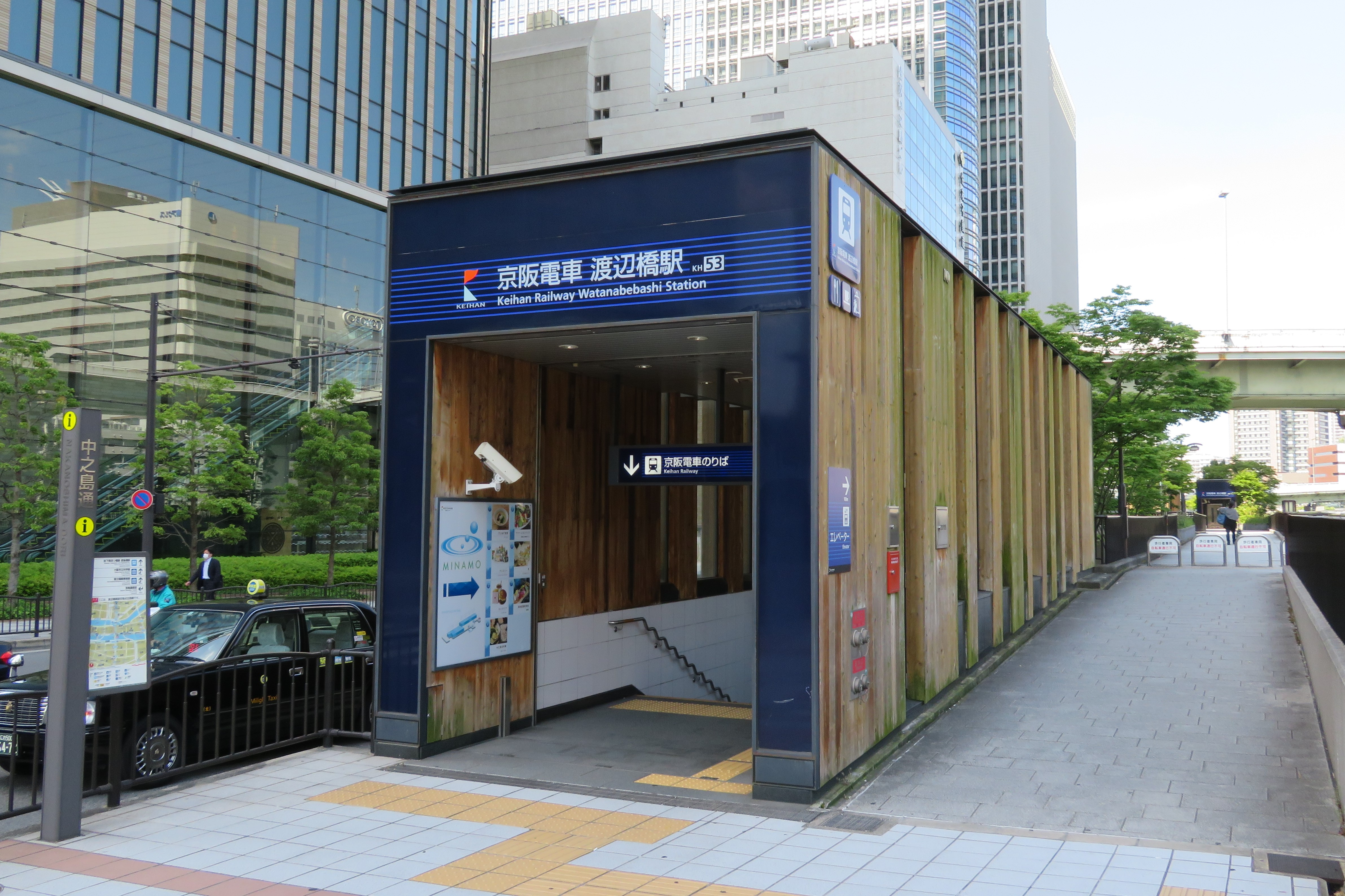 京阪電鉄渡辺橋駅